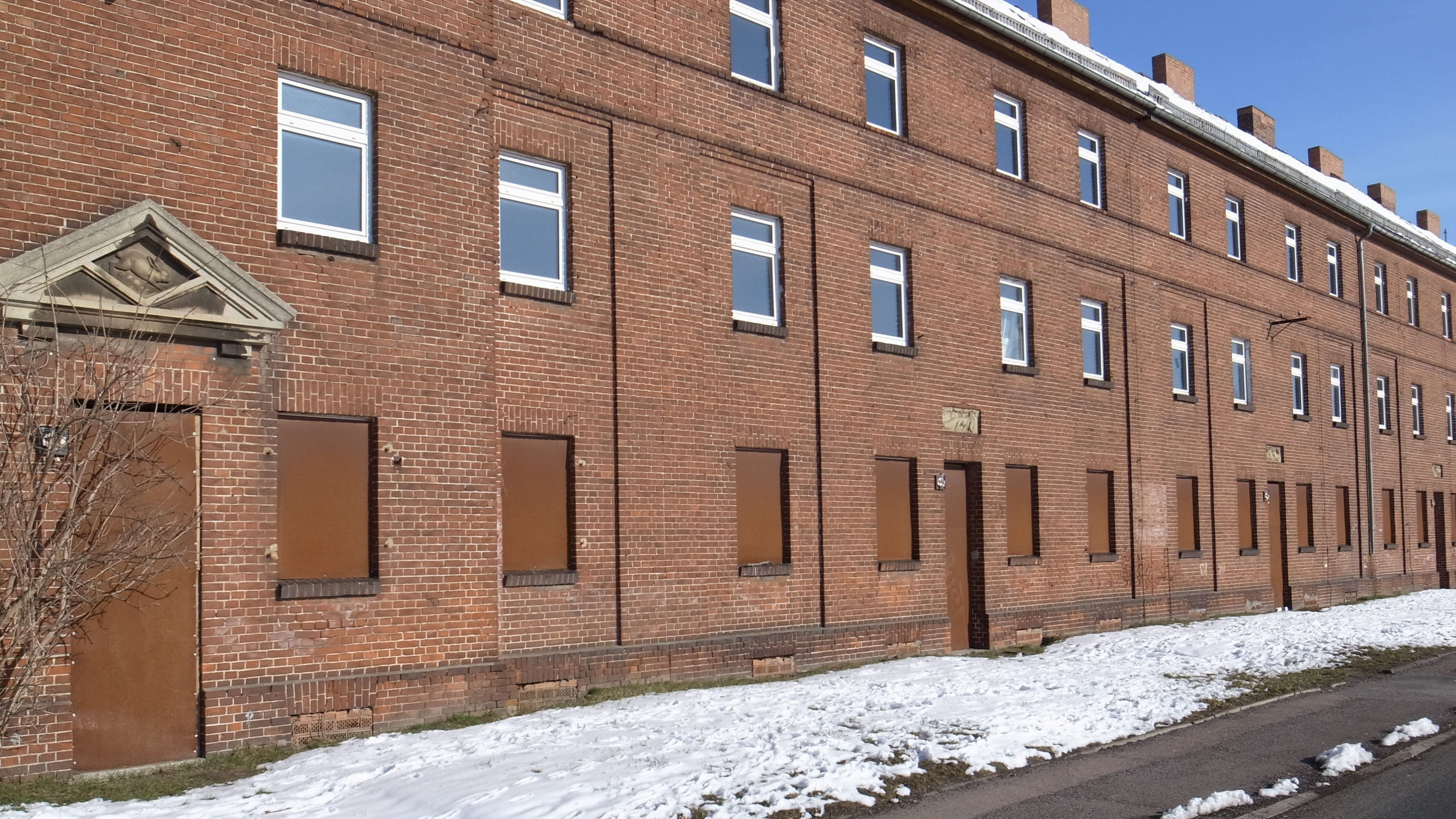 Dessau-Roßlau, Tierreliefs in der Thomas-Müntzer-Straße. Der Wohnblock wurde 2016 abgerissen. Die vom Bildhauer Ehepaar Kieser-Maruhn geschaffenen Tierreliefs wurden eingelagert. (Quelle: LebensRäume, 3/2016 Magazin der Wohnungsgenossenschaft Dessau eG, Seite 10.[1])